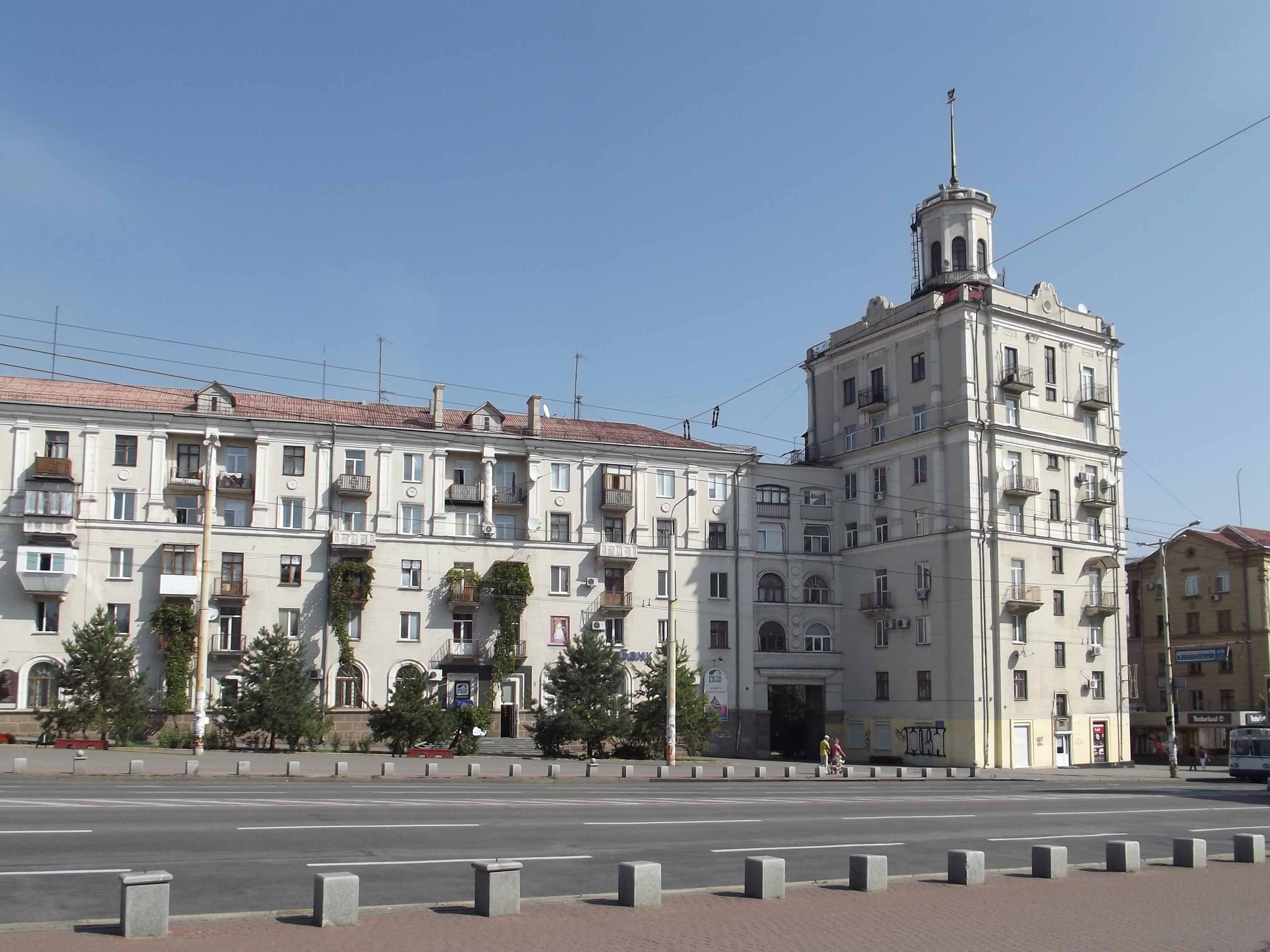 Дом с башней